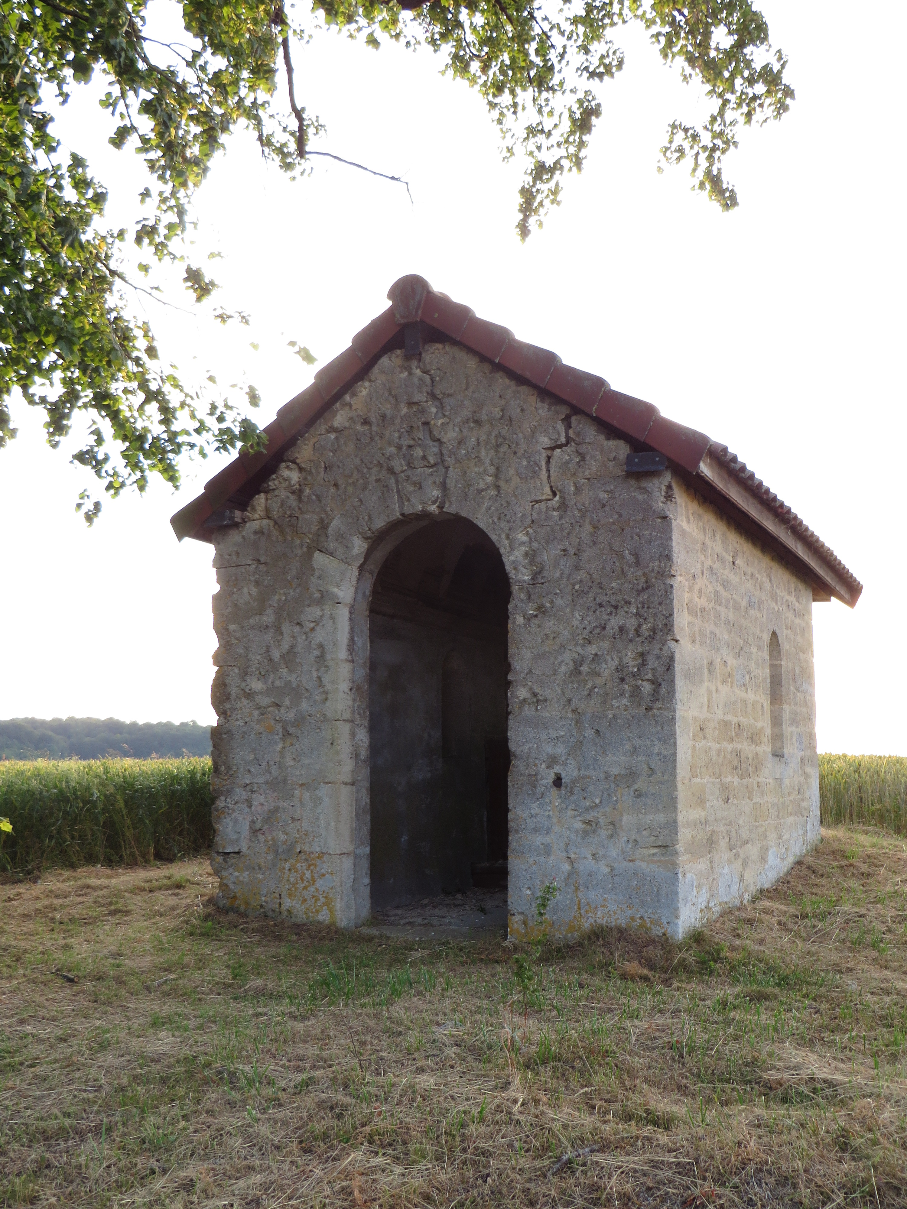 Sassey-sur-Meuse La chapelle Notre-Dame-de-la-Salette